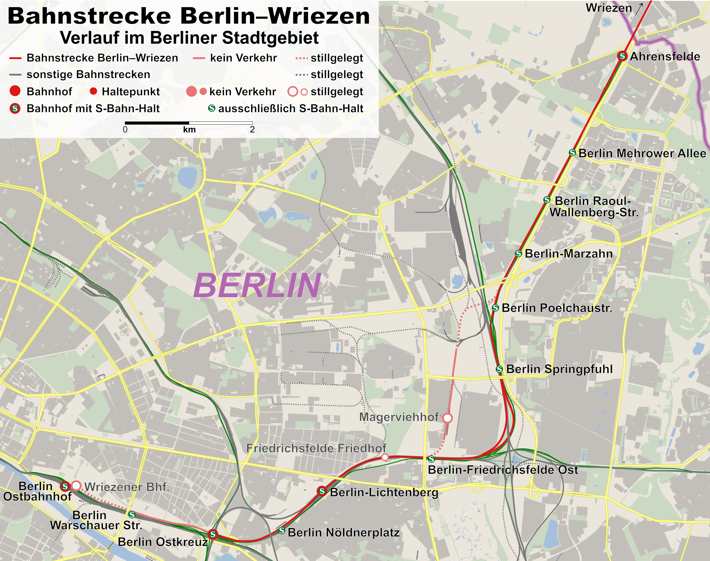 Verlauf der Bahnstrecke Berlin–Wriezen im Berliner Zentrum. This map may be incomplete, and may contain errors. Don't rely solely on it for navigation.